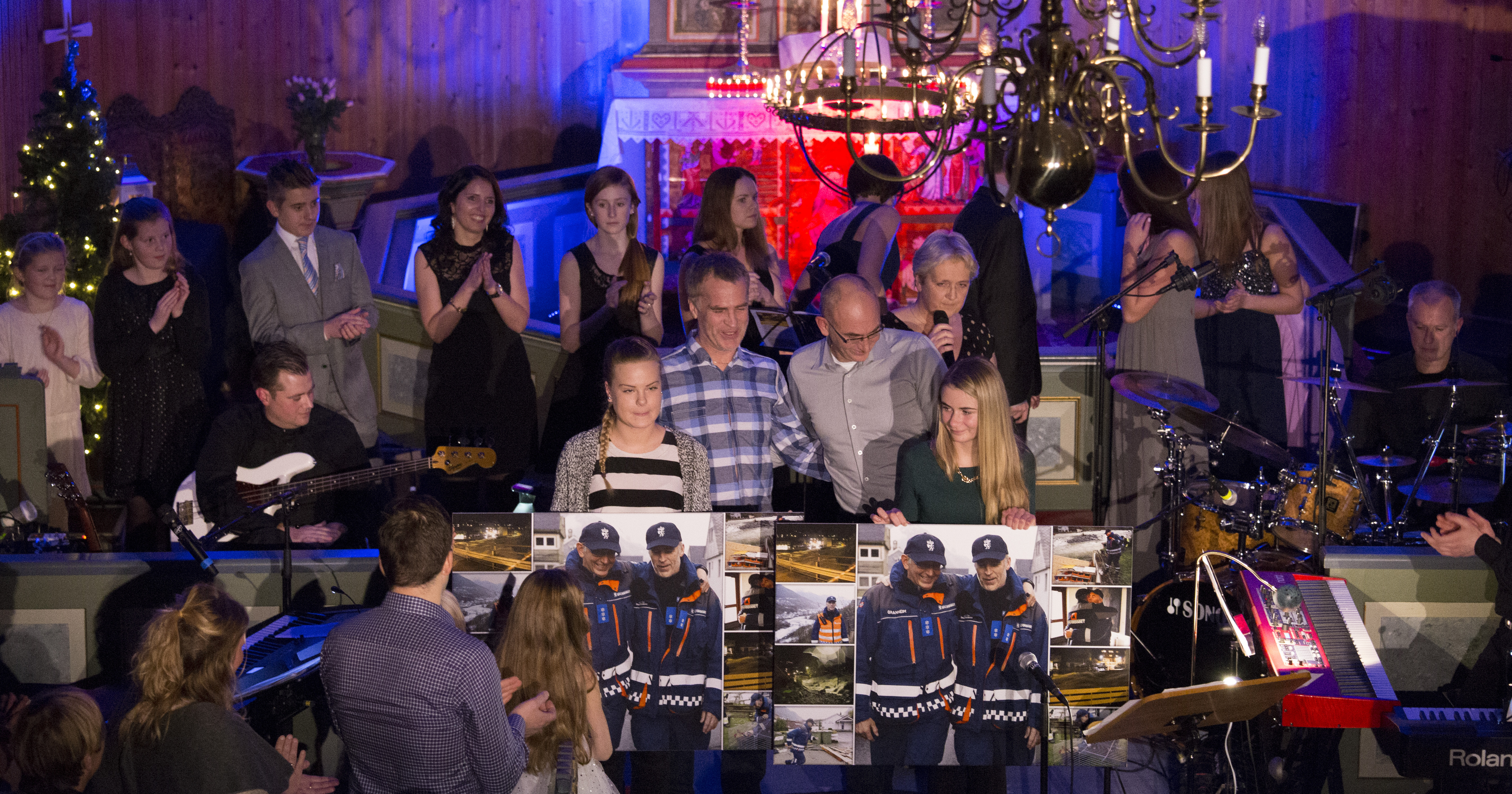 Etter flommen i Odda i 2014, mottok Jan Åge Stengårdsbakken og Knut Granheim Omsorgsprisen. Prisen ble delt ut av døtrene Solvår og Janne.